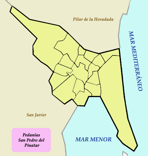 Mapa con las pedanías del municipio